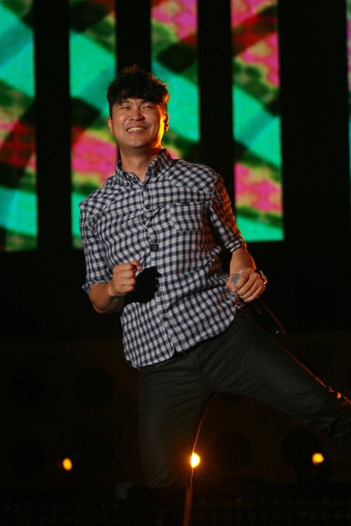 다이나믹 듀오 최자